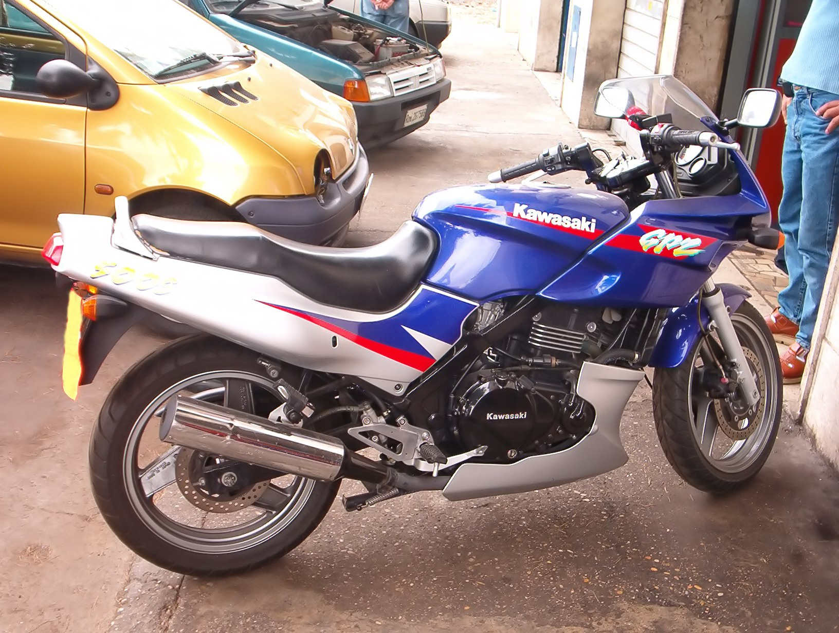 Kawasaki GPZ 500 S Photo taken in 2003